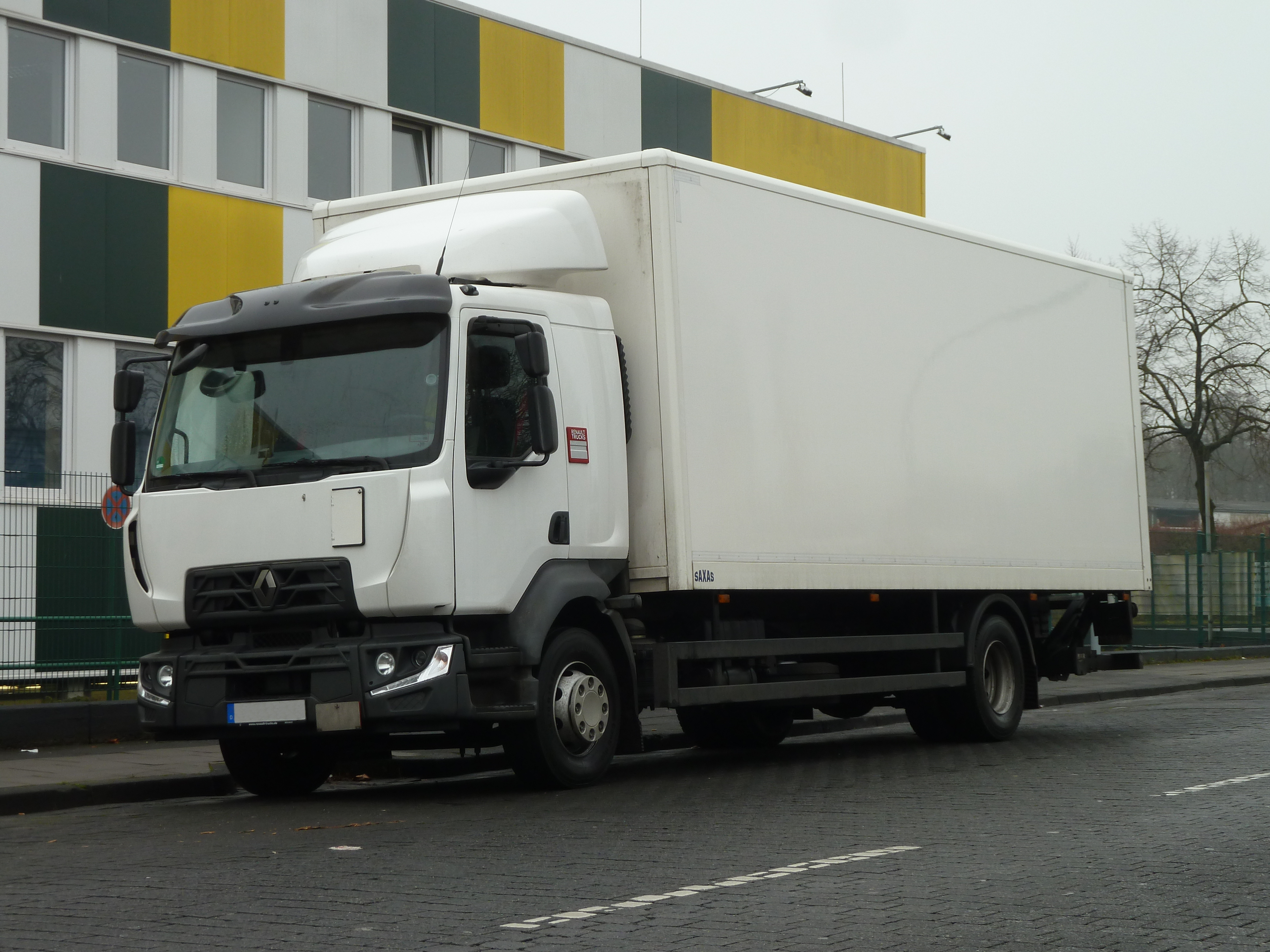 Renault D-Truck mittelschwere Ausführung mit Führerhaus mit 2,10 Meter Breite